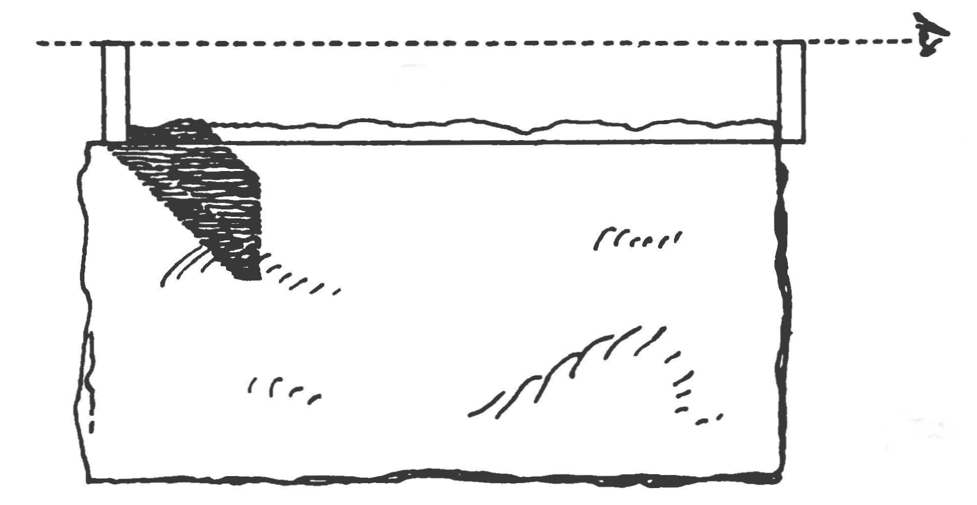 Vierten Eckpunkt der Ranschläge mit Richtscheiten einvisieren (Seitenansicht).